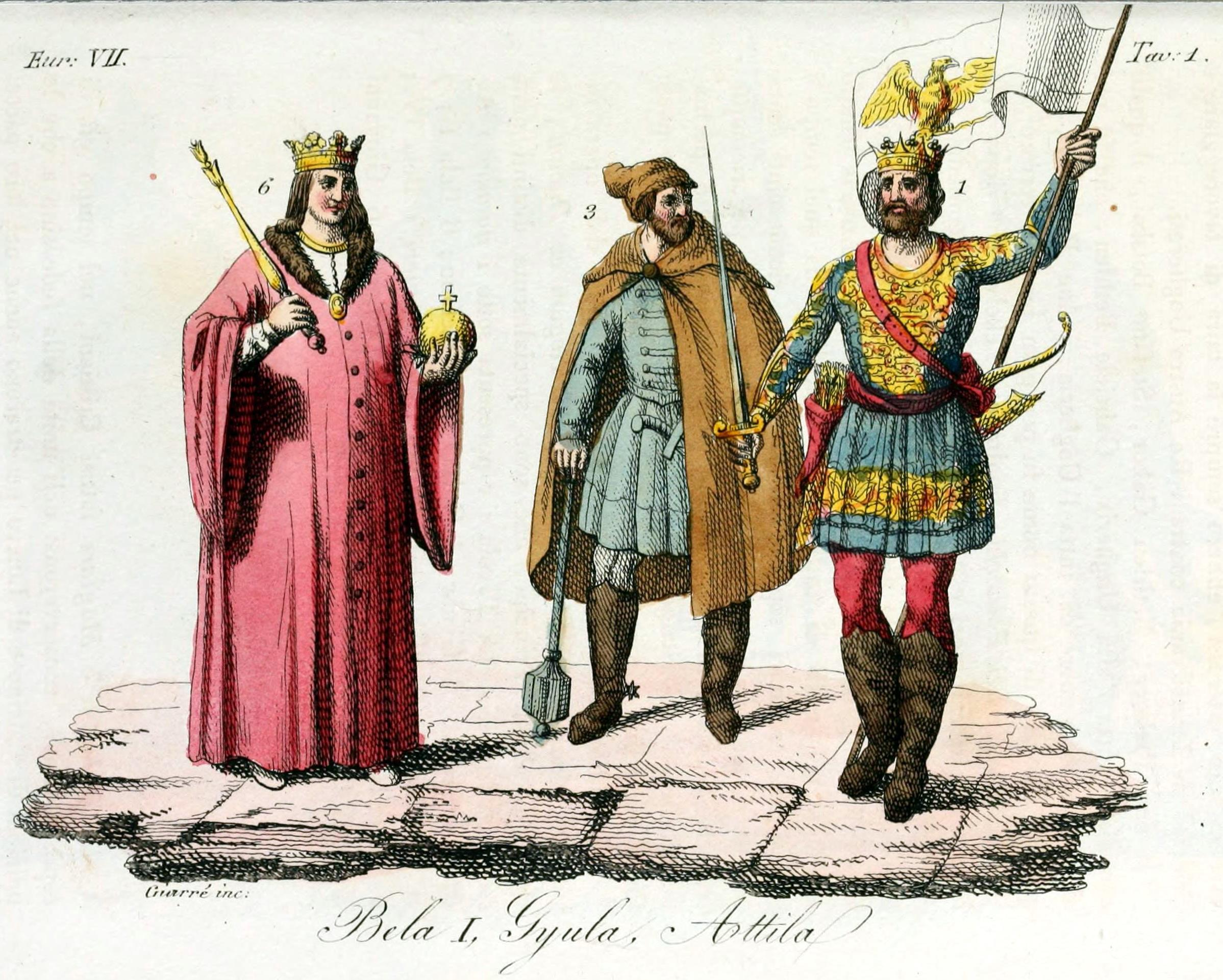 1. Attila 3. Gyula 6. Bela I